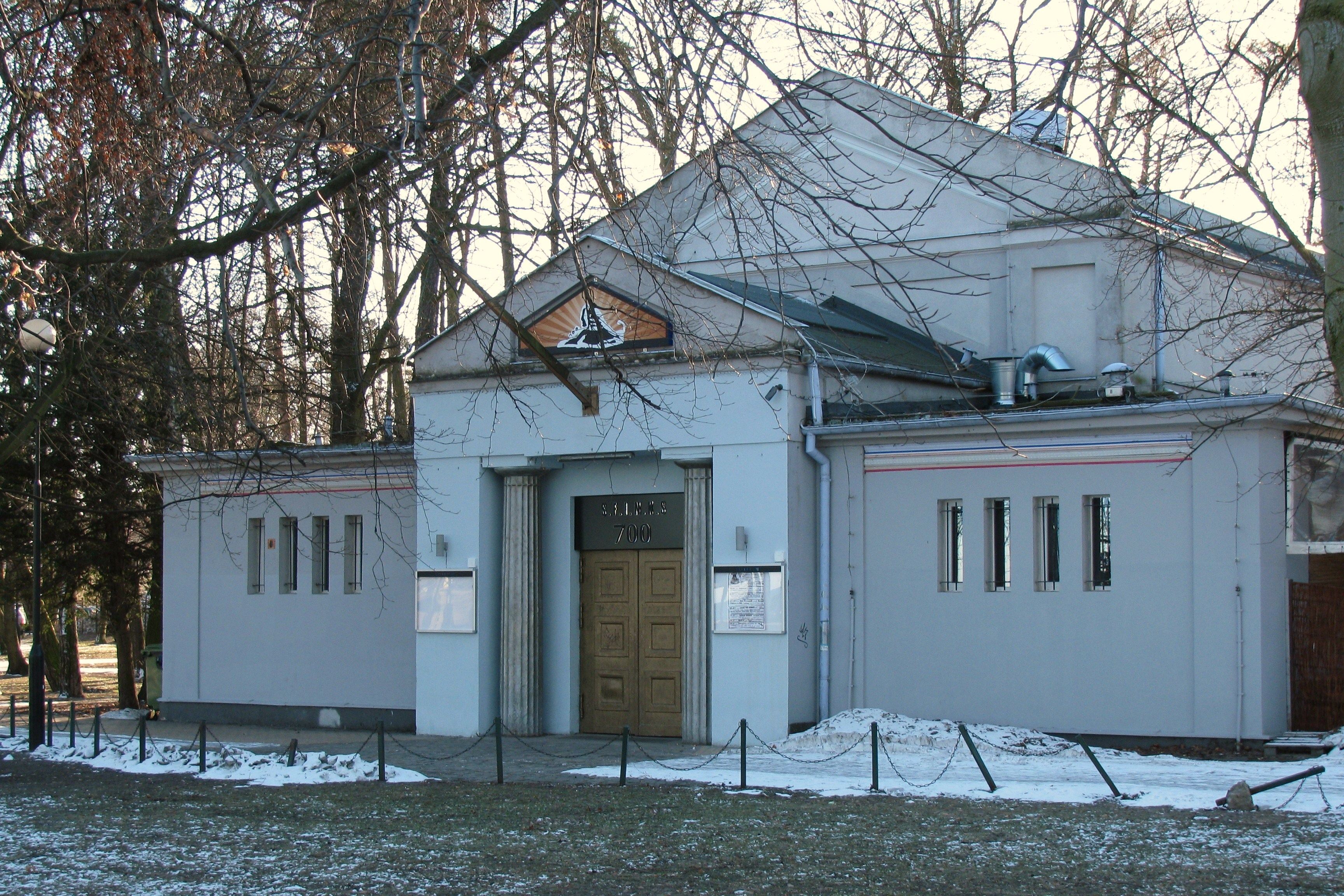 Sopot Dolny, ul. Mamuszki 1 - Park Północny, klub Sfinks.